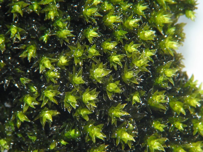 Graue Zackenmütze (Racomitrium canescens), angefeuchtet